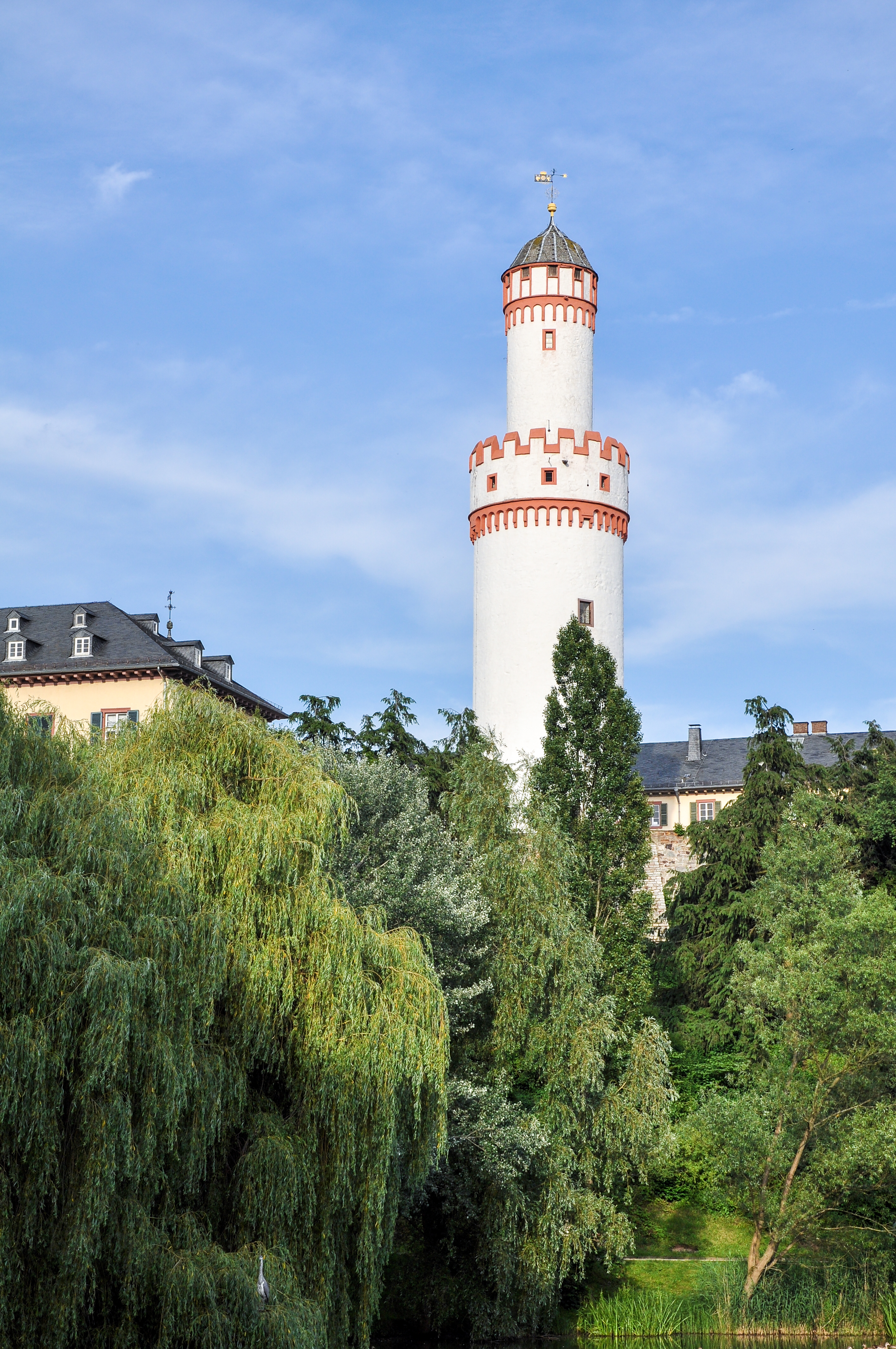 Weißer Turm Bad Homburg über Schloßparkweiher